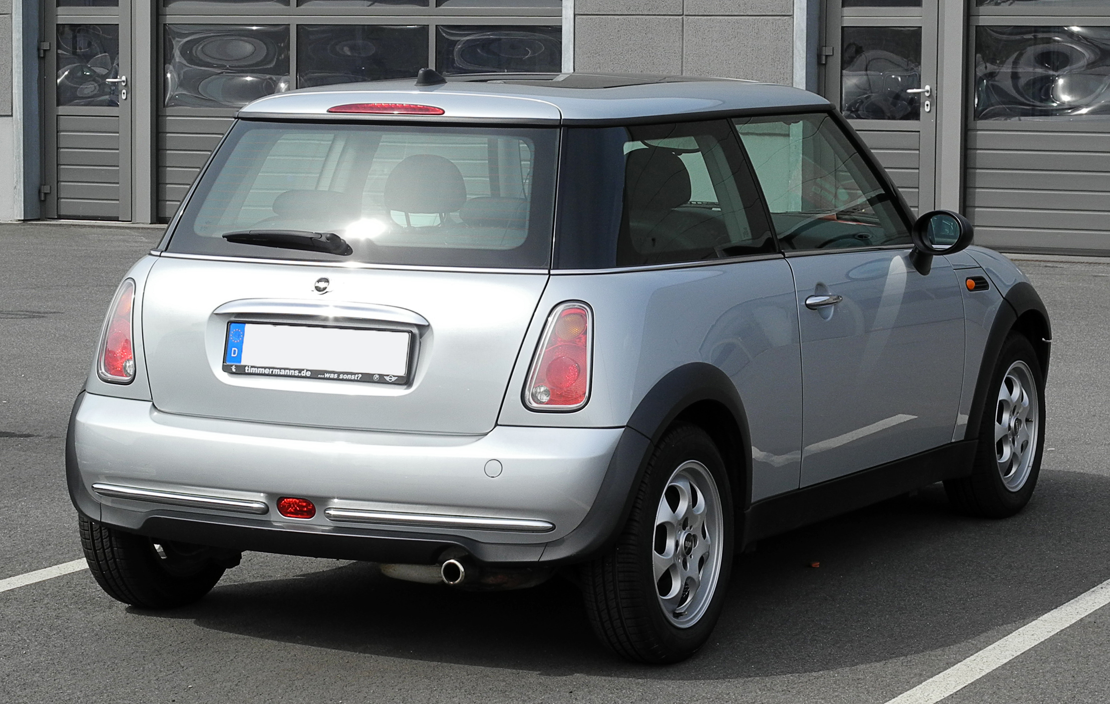 Mini One (R50)